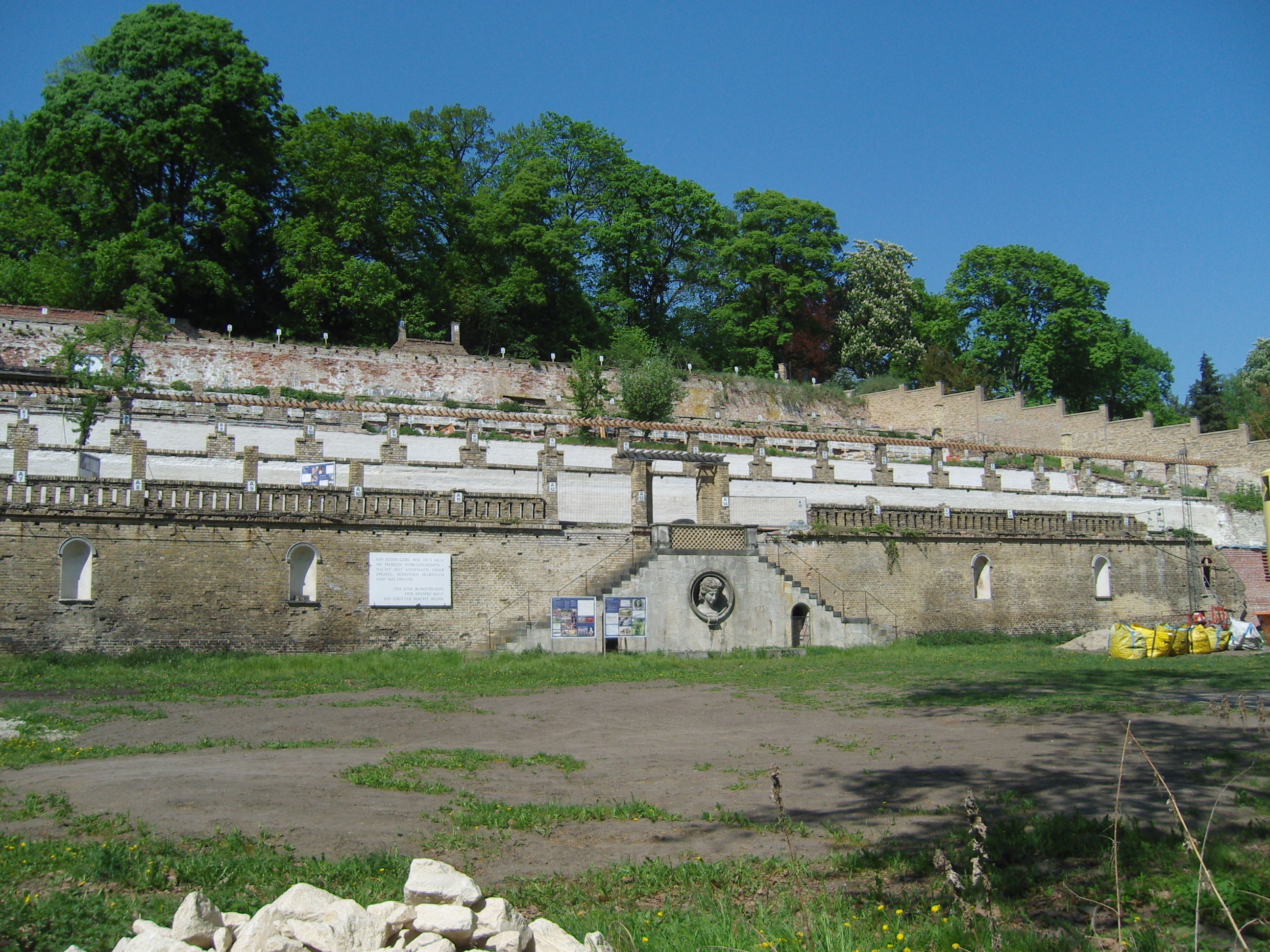 Winzerberg in Potsdam während der Sanierung 2012